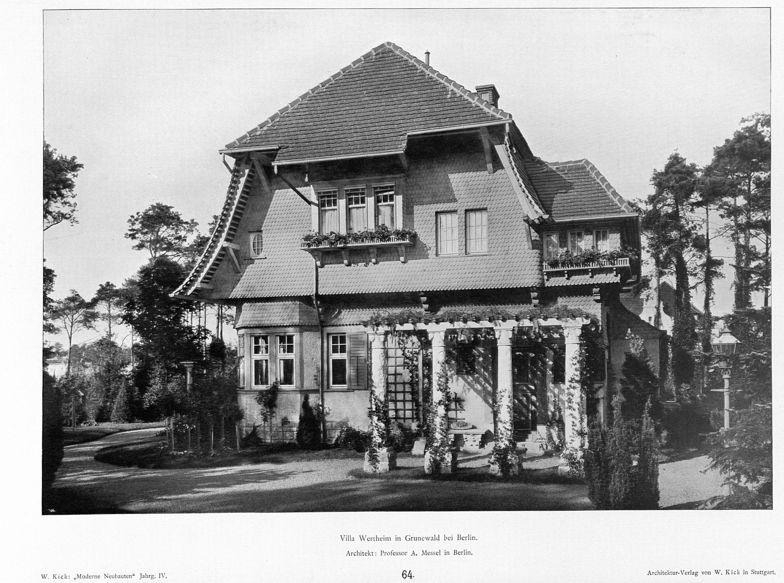 Villa Wilhelm Wertheim in Berlin-Grunewald, Siemensstraße 2/4 (heute Lassenstraße 2/4); erbaut 1899 nach Entwurf der Berliner Architekten Alfred Messel und Martin Altgeld; 1925/1926 erweitert; unter Denkmalschutz